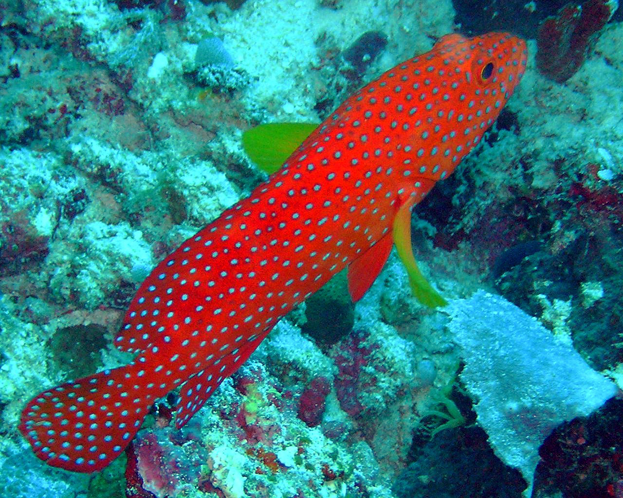 Juwelenbarsch, auch Juwelen-Zackenbarsch, Cephalopholis miniata Malediven, Veligandu, Dezember 2004